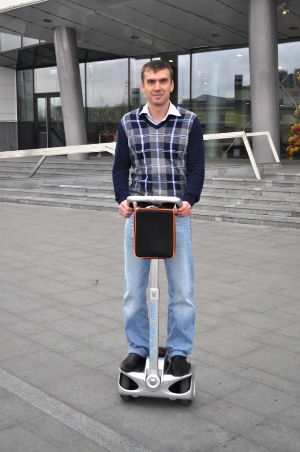 Человек на Robin-M1